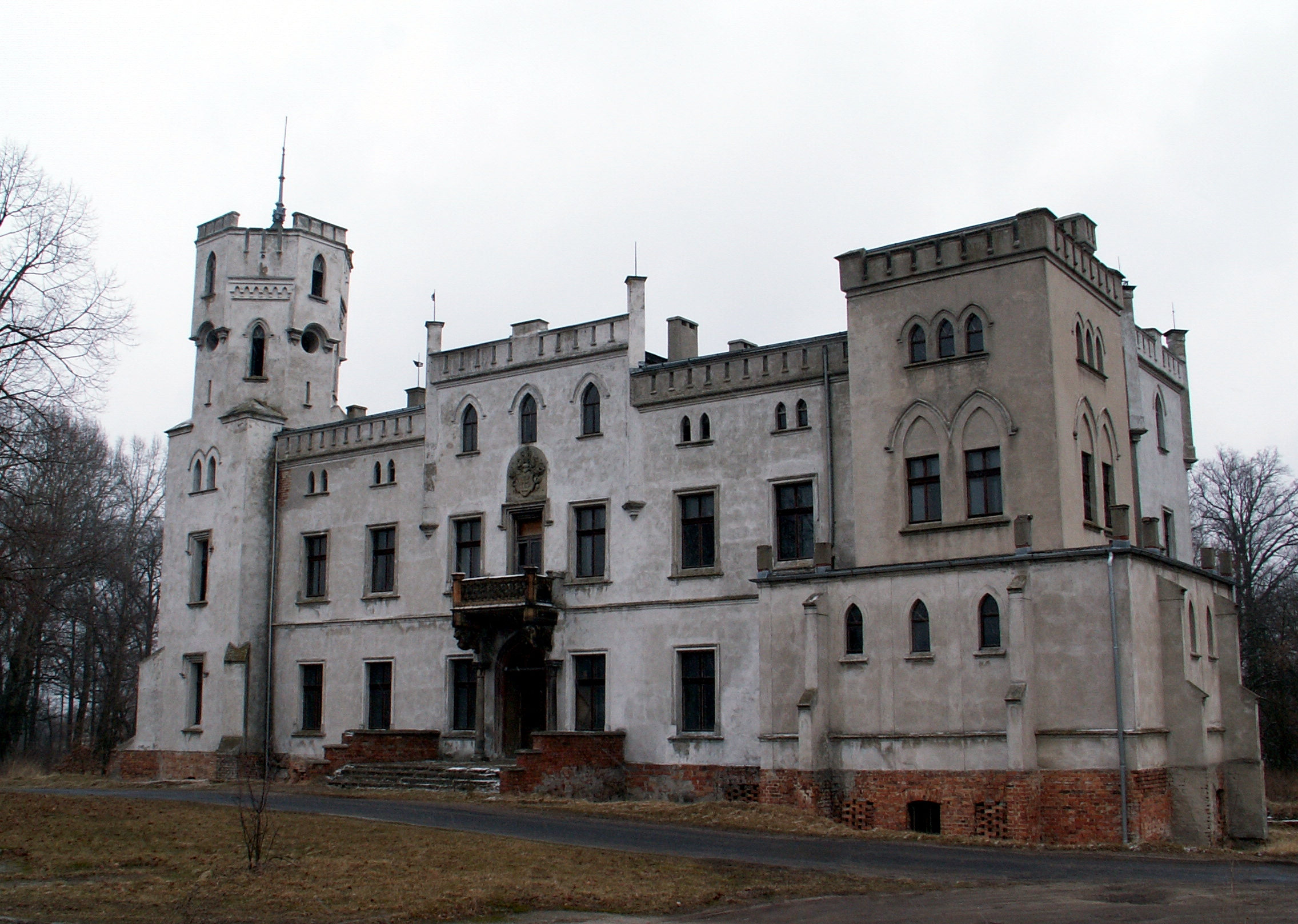 Pałac z XVI wieku w Drwalewicach (województwo lubuskie)